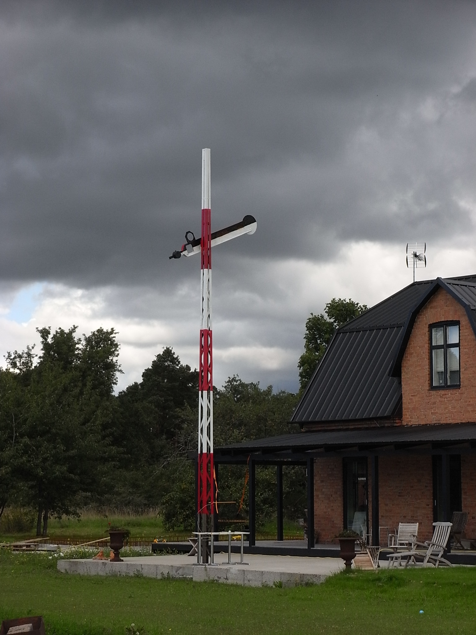 Signal am ehemaligen Bahnhof Hablingbo auf Gotland im Jahr 2010